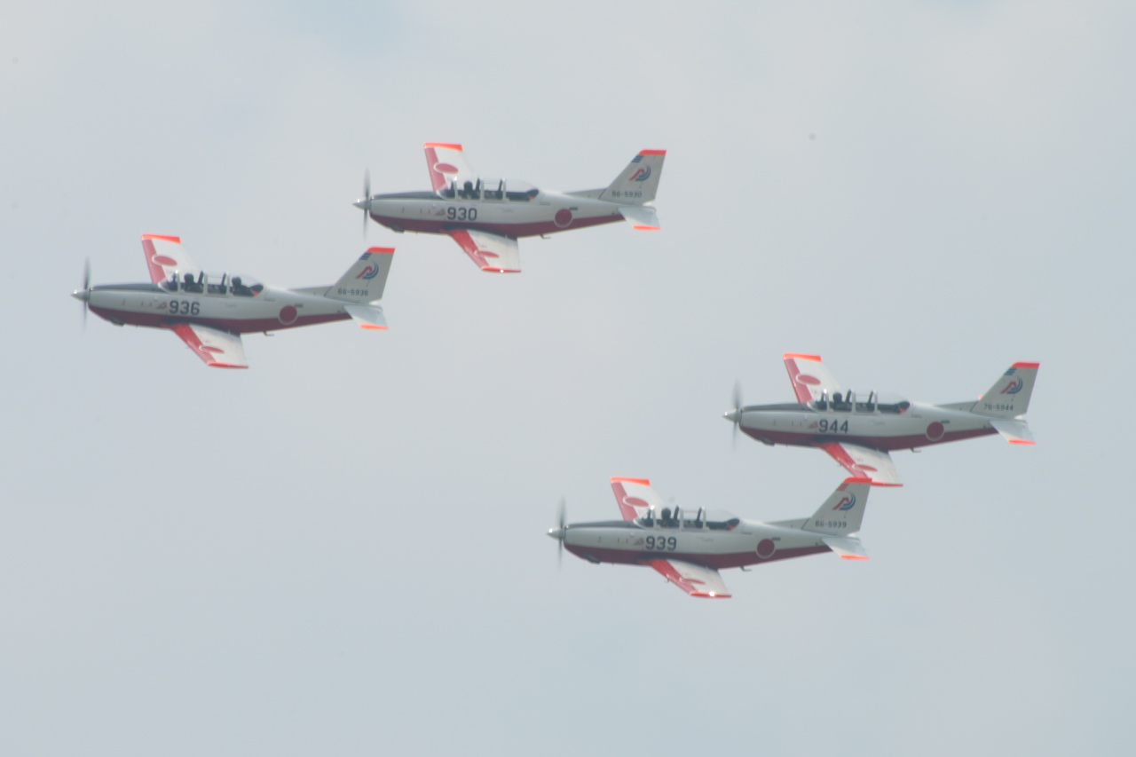 T-7の4機によるデルタフォーメーション。